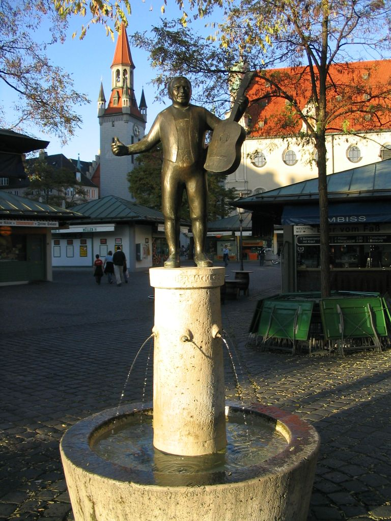 Roider-Jackl-Brunnen auf dem Viktualienmarkt in München, fotografiert von Ramgeis im Oktober 2004, GNU-FDL